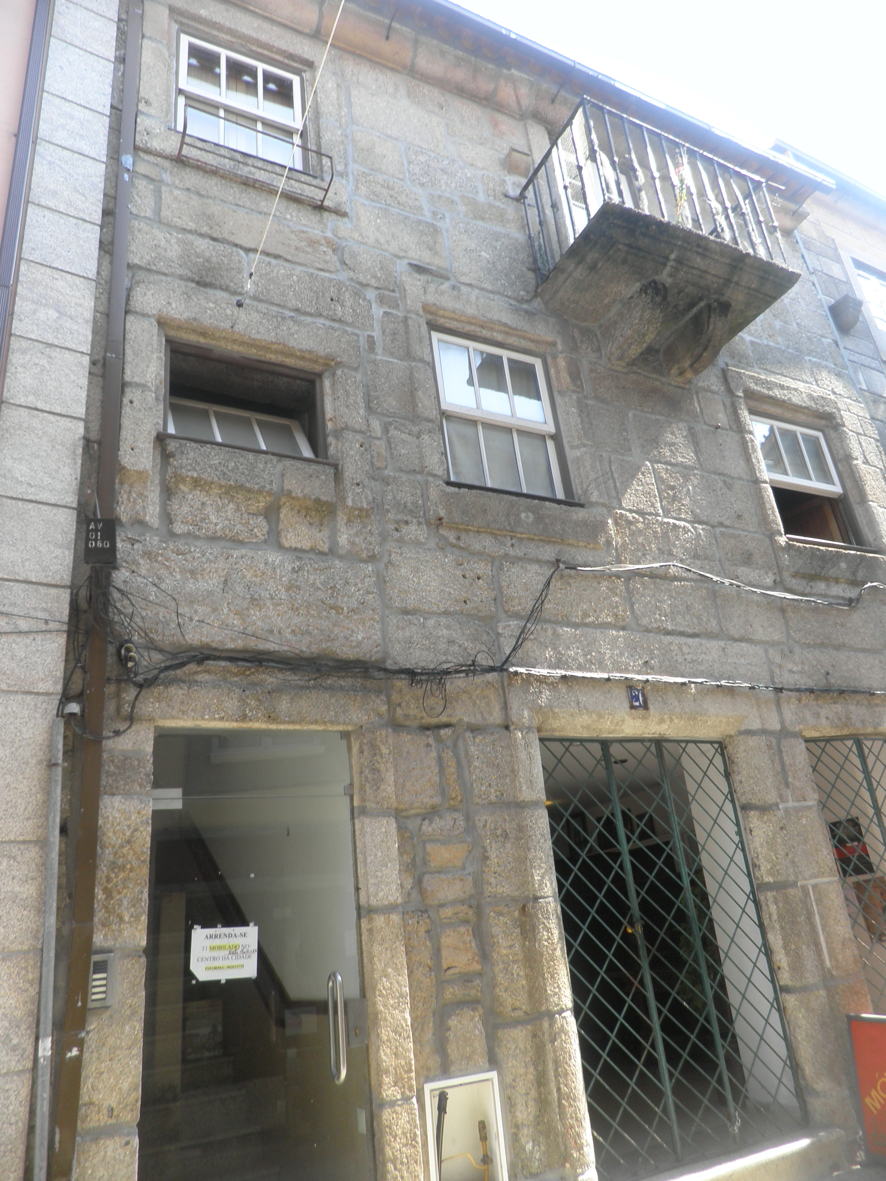 Edifício do século XVI. This file was uploaded for Wiki Loves Monuments in Portugal with the unique identifier 71057.